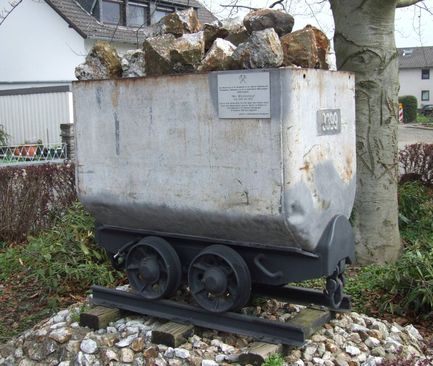 Hunt aus der Kupfergrube Sankt Marienberg (1668 bis 1874), Kreuzung Marienbergstraße/Gartenstraße, Bruchhausen